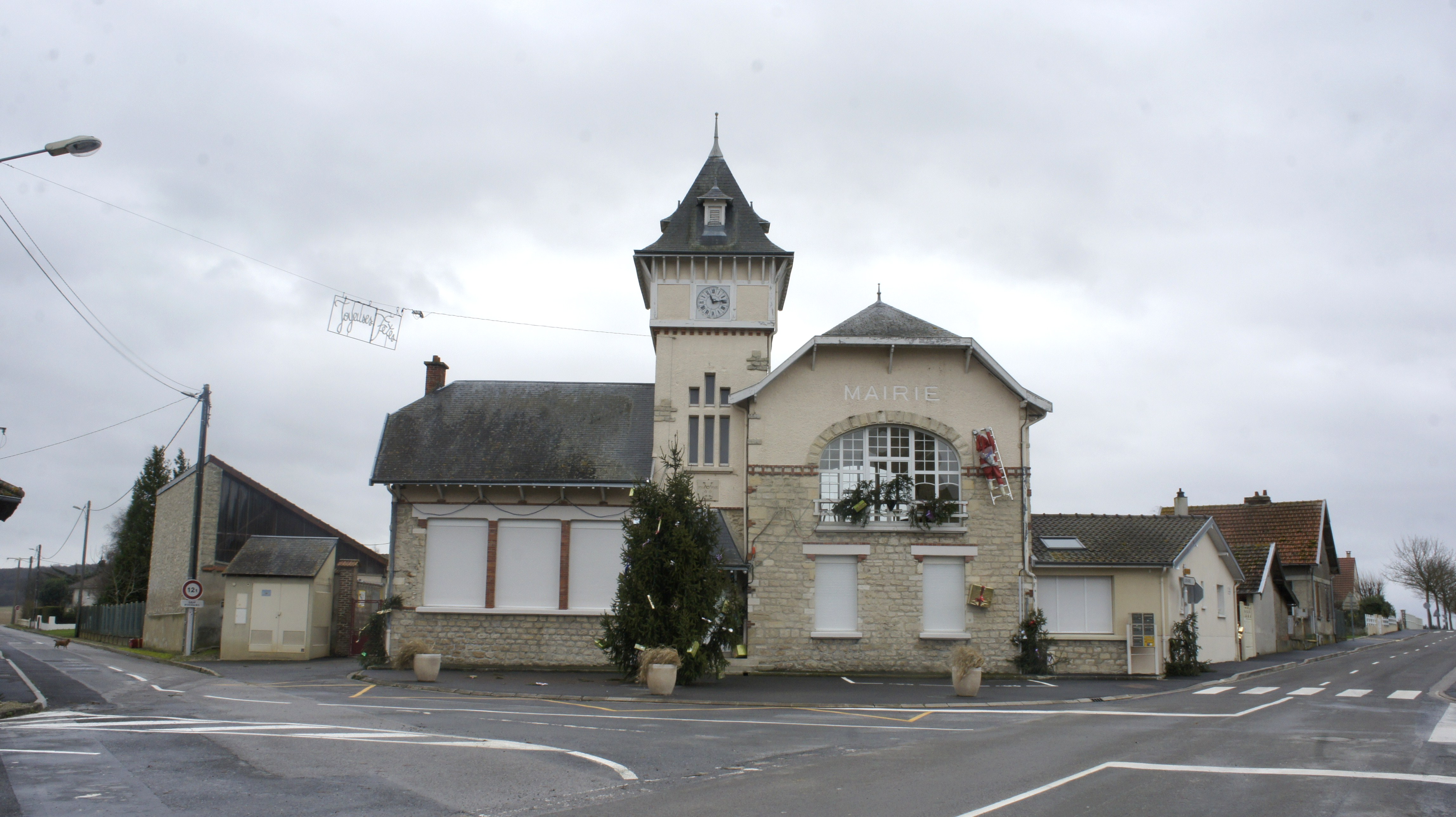 Mairie_à Bermericourt .